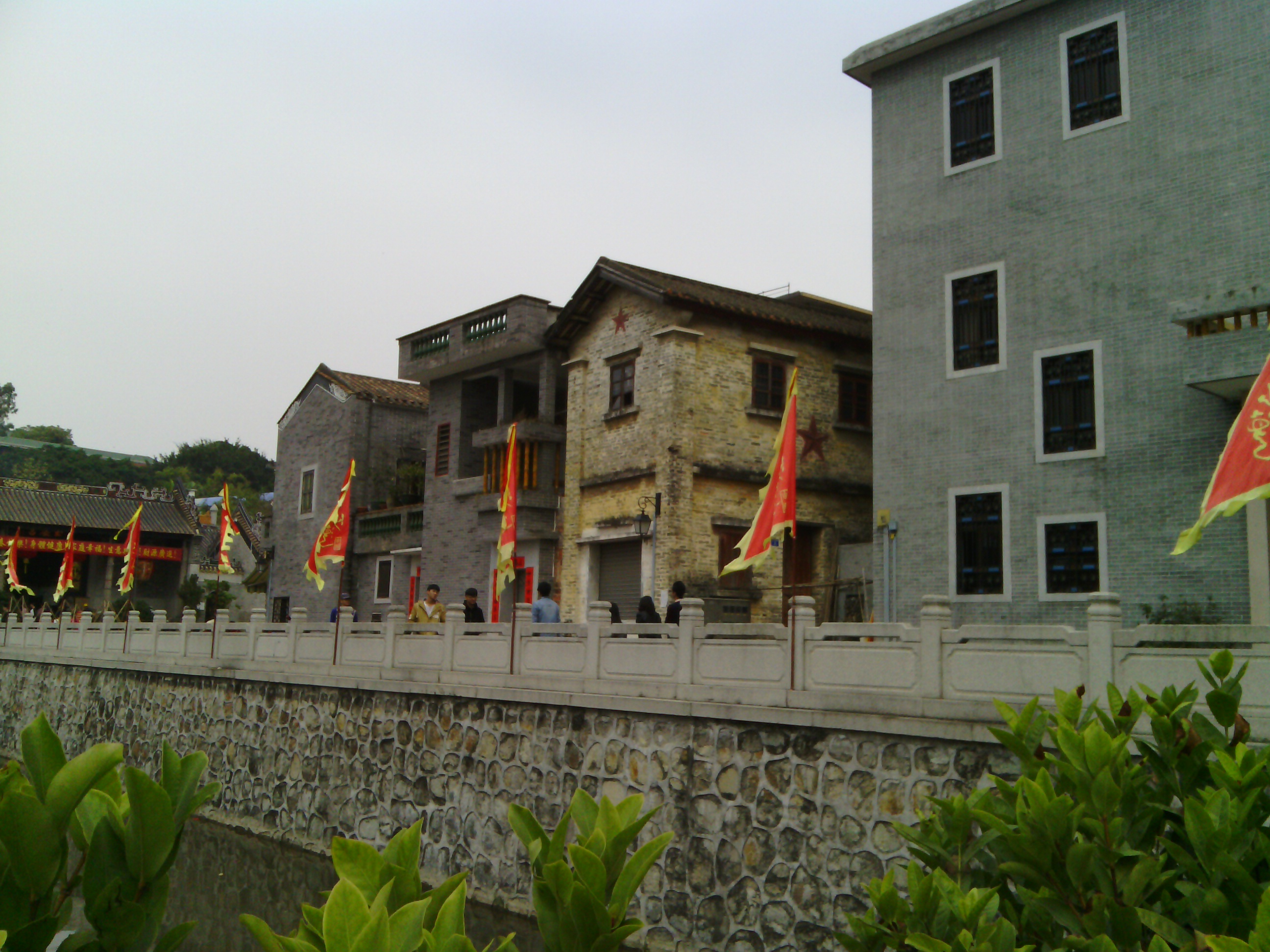 A sight-seeing of Shawan Town in Panyu District